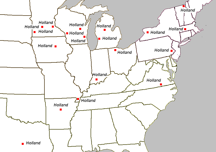 Eigen Kaart